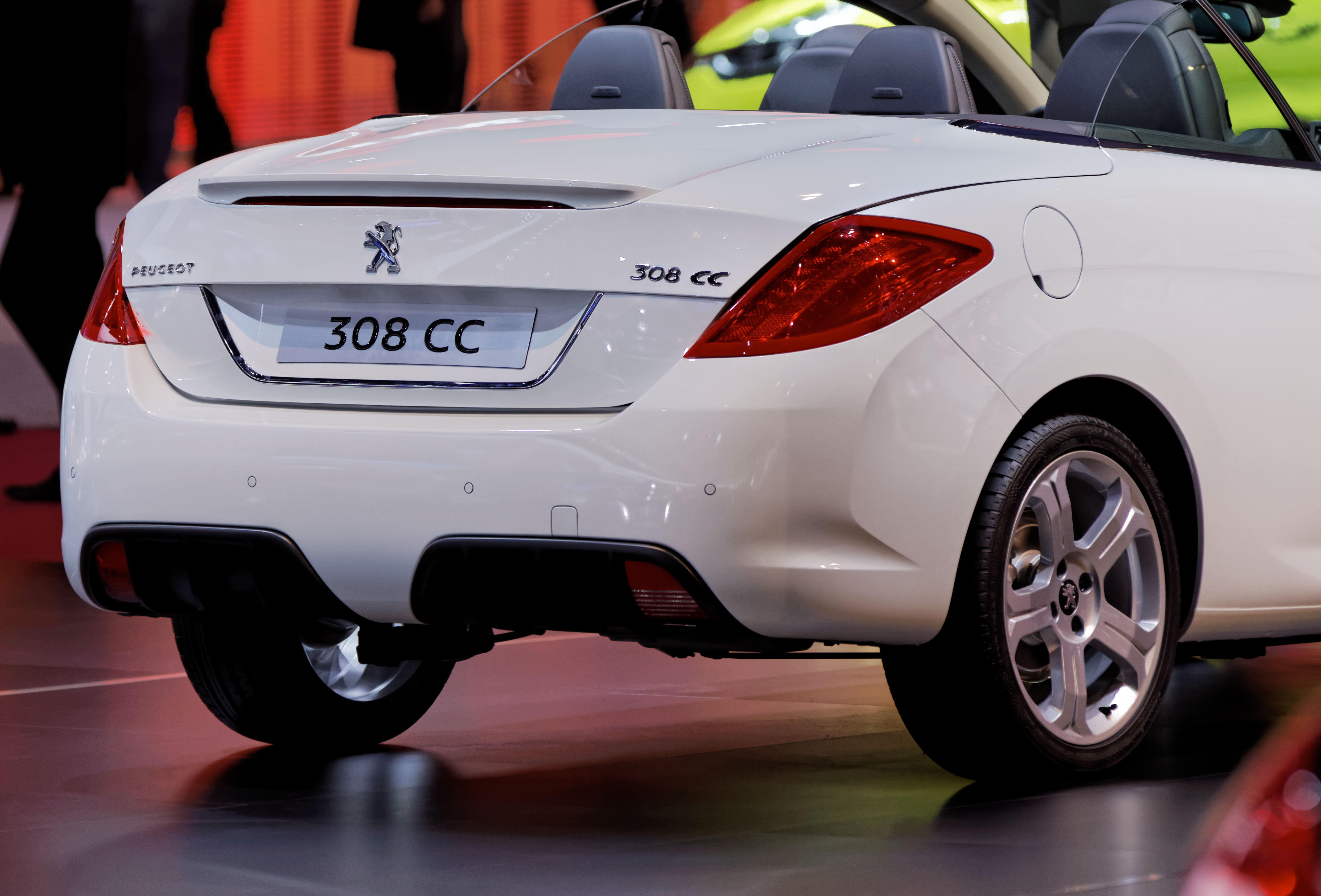 Une Peugeot 308 CC présentée lors du Mondial de l'Automobile de Paris 2012.